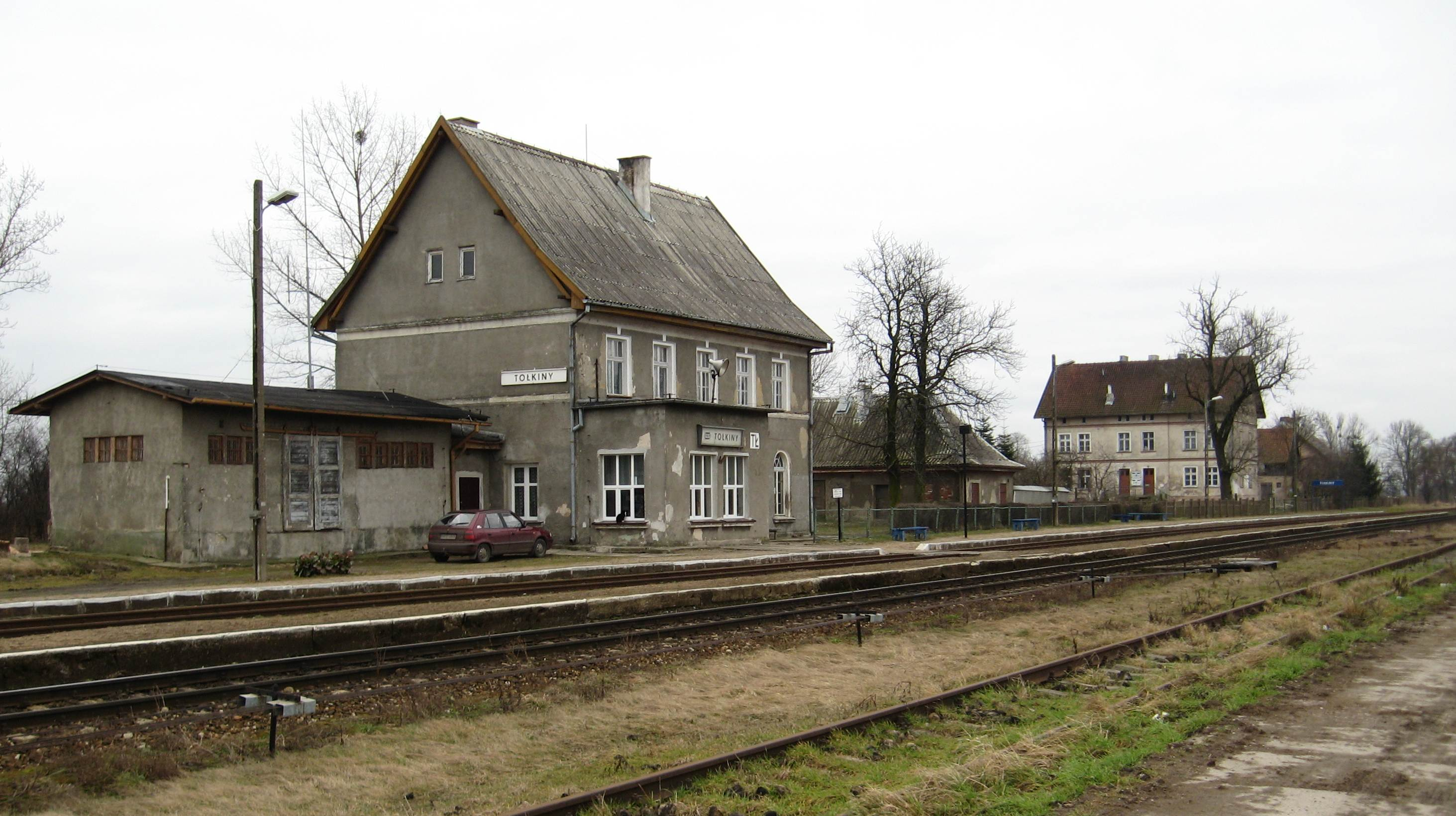 stacja kolejowa w Tołkinie.